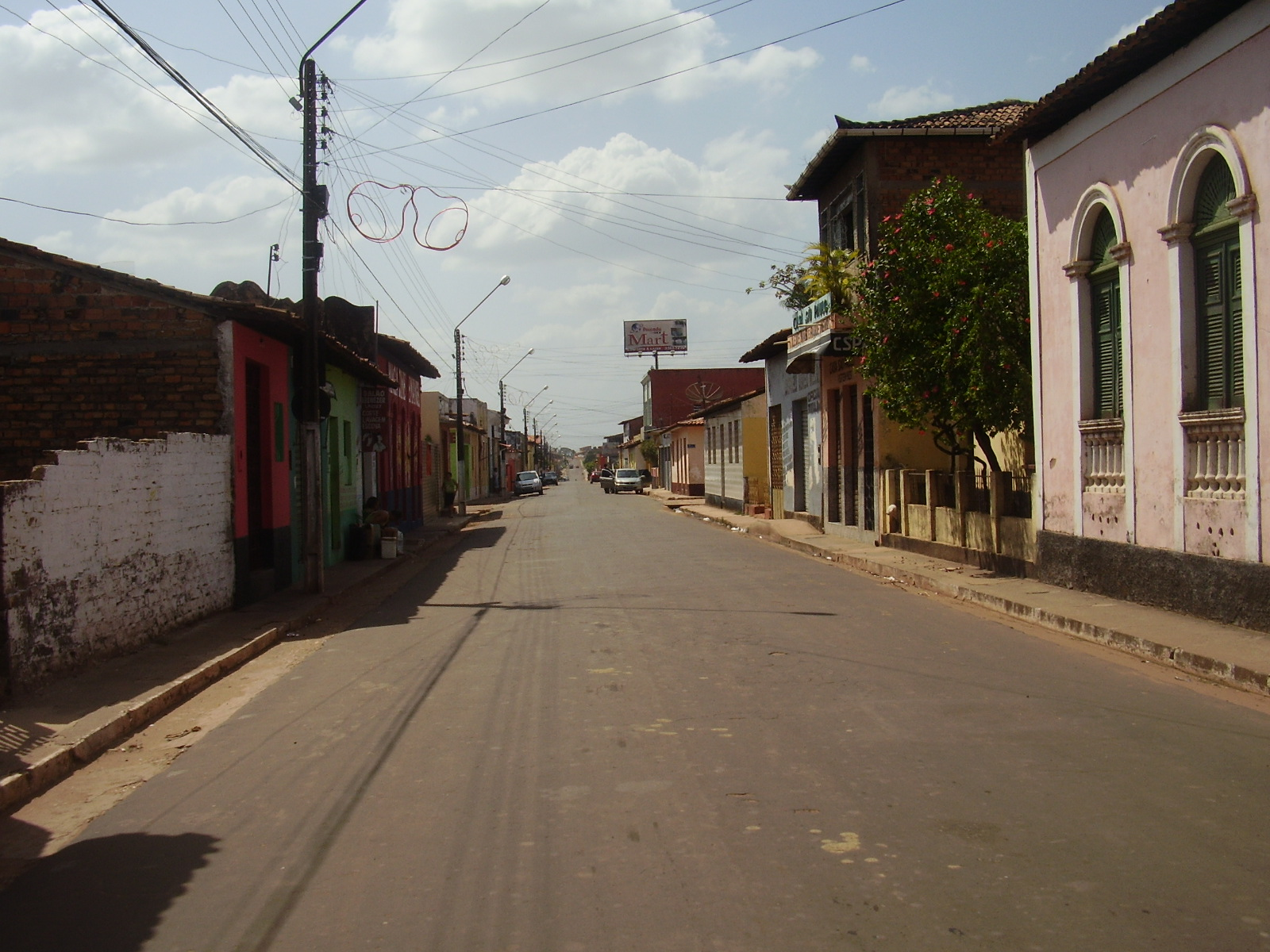 Avenida Newton Bello, em São Bento, Maranhão